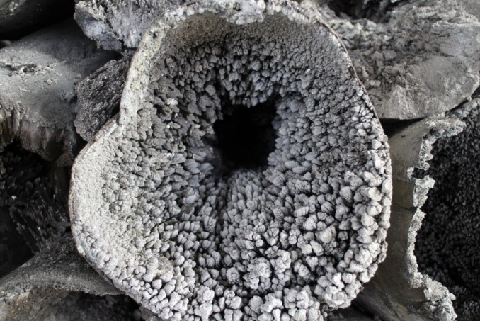 کرون های تولید شده در واحد ریخته گری